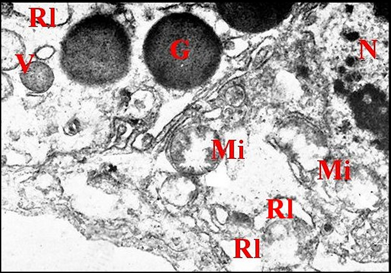 Parties basales d'adénocytes prégonoporaux de Pholcus phalangioides vues au microscope électronique